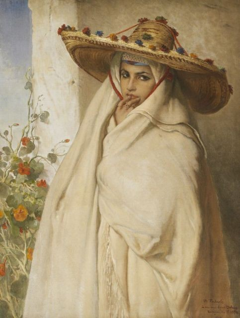 Aouicha